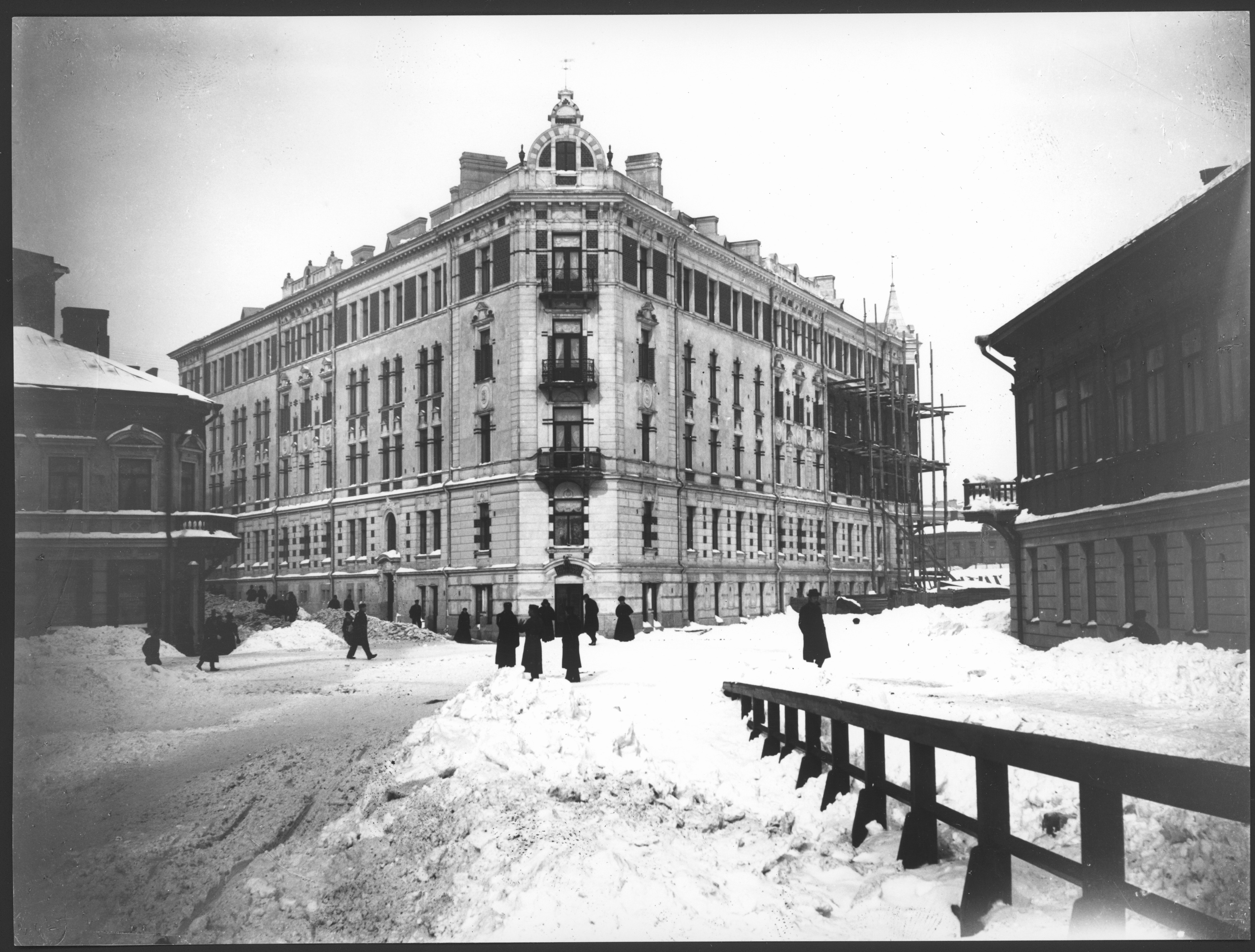 Wuorisen talo, Viiskulma, Fredrikinkatu 19 - Laivurinrinne 2, 00120 Helsinki